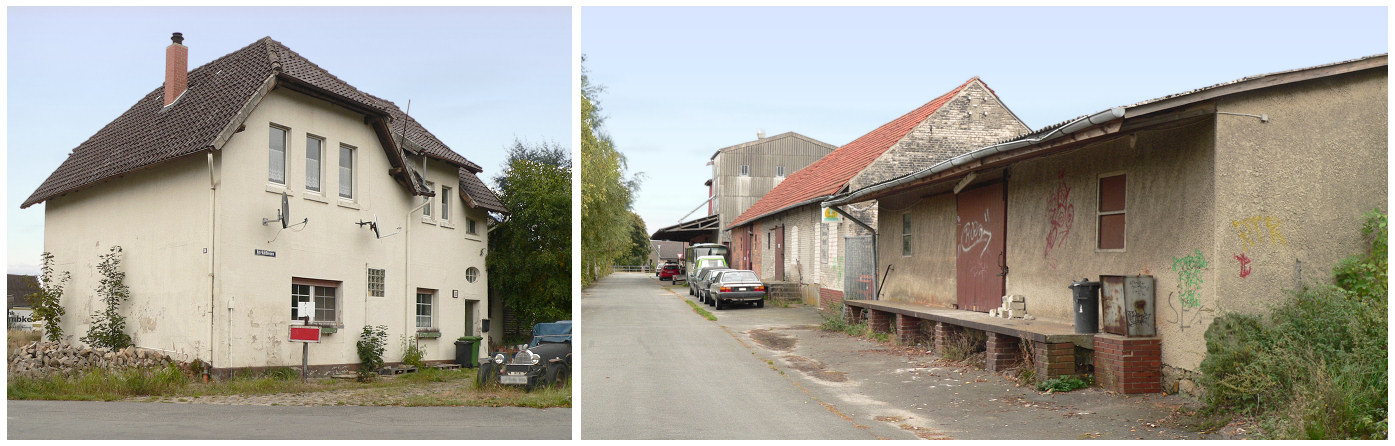 Ehemaliger Bahnhof in Rühen, Niedersachsen, Deutschland.